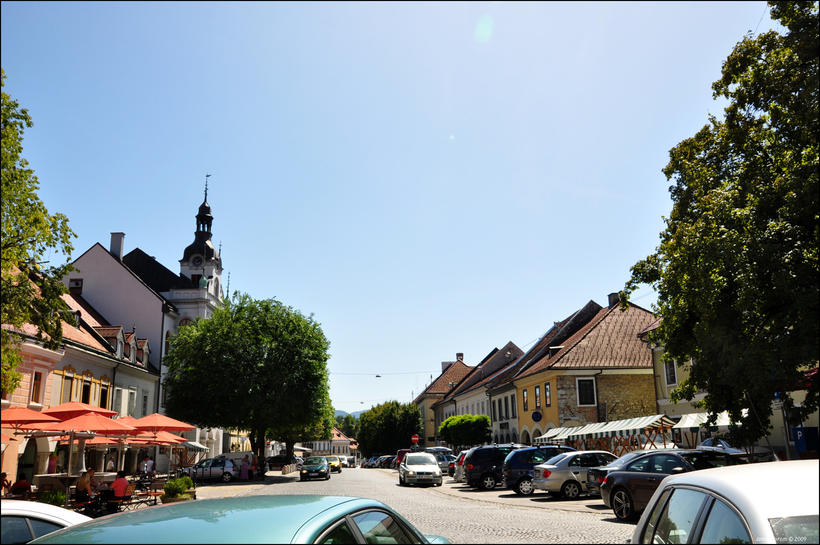 Novo Mesto (20)